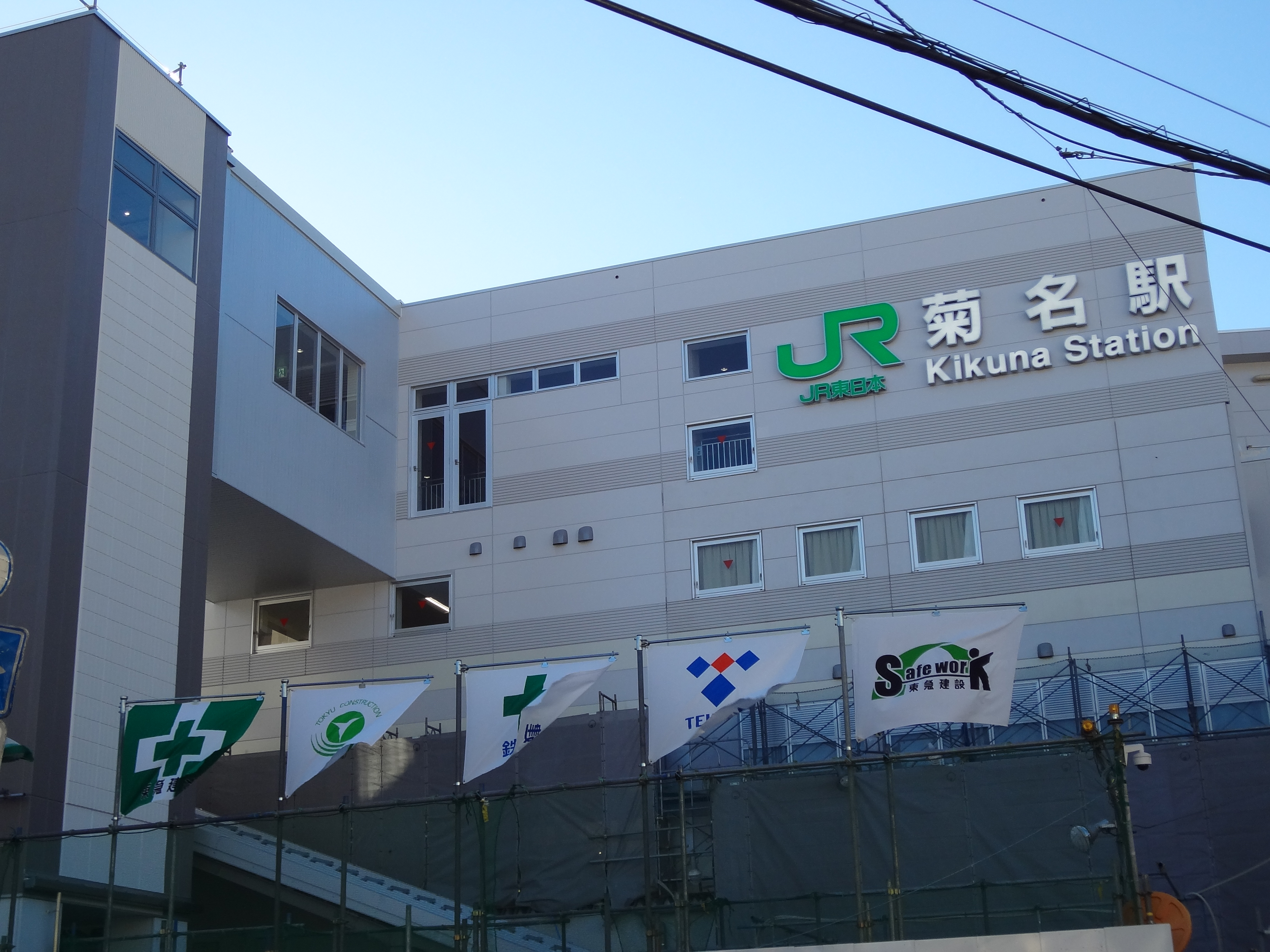 JR駅舎（2017年12月17日）